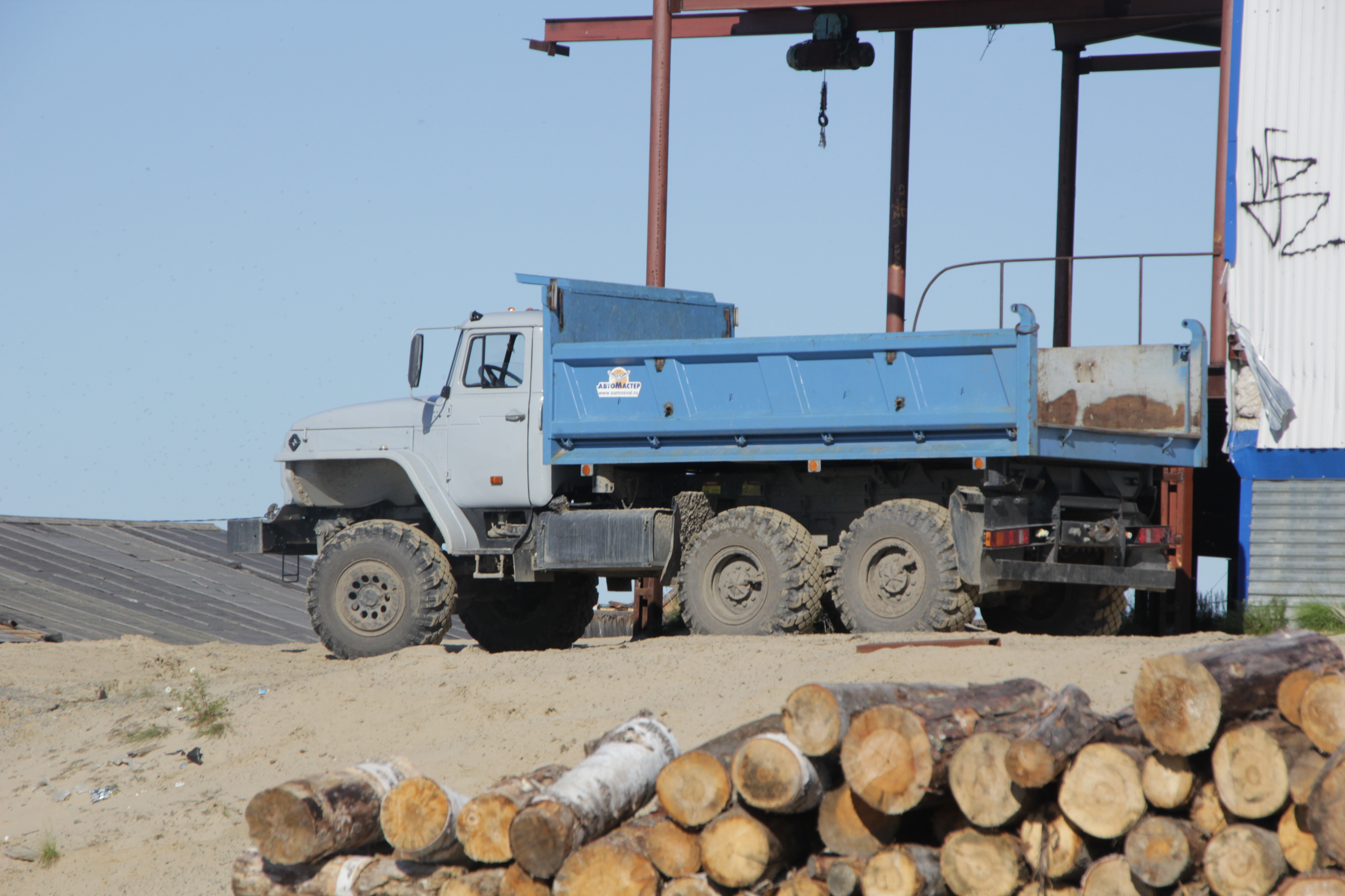 Ural-5557 auf einer Baustelle in Nowy Port, Nordsibirien